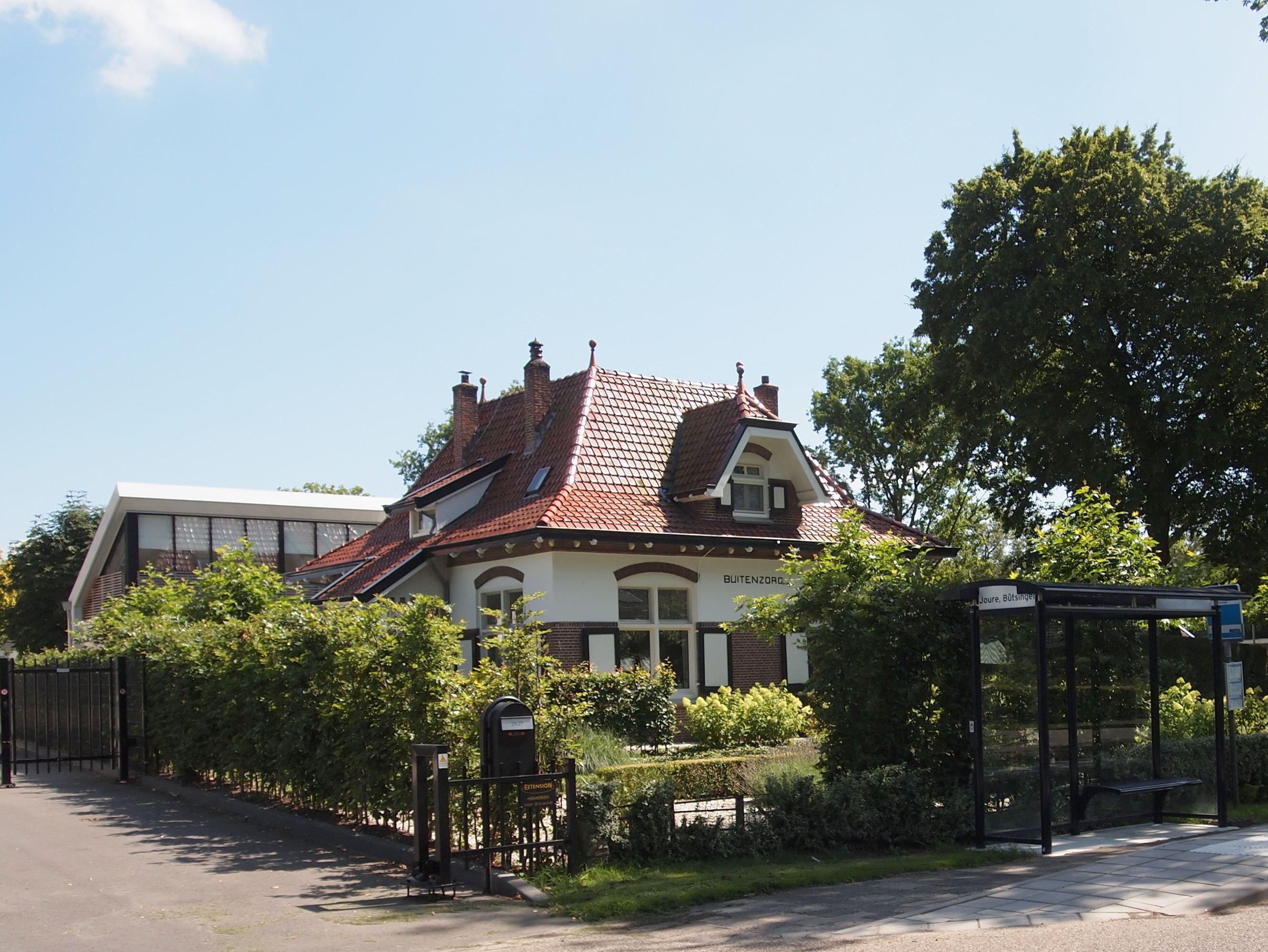 Buitenzorg, Harddraversweg 29, Joure